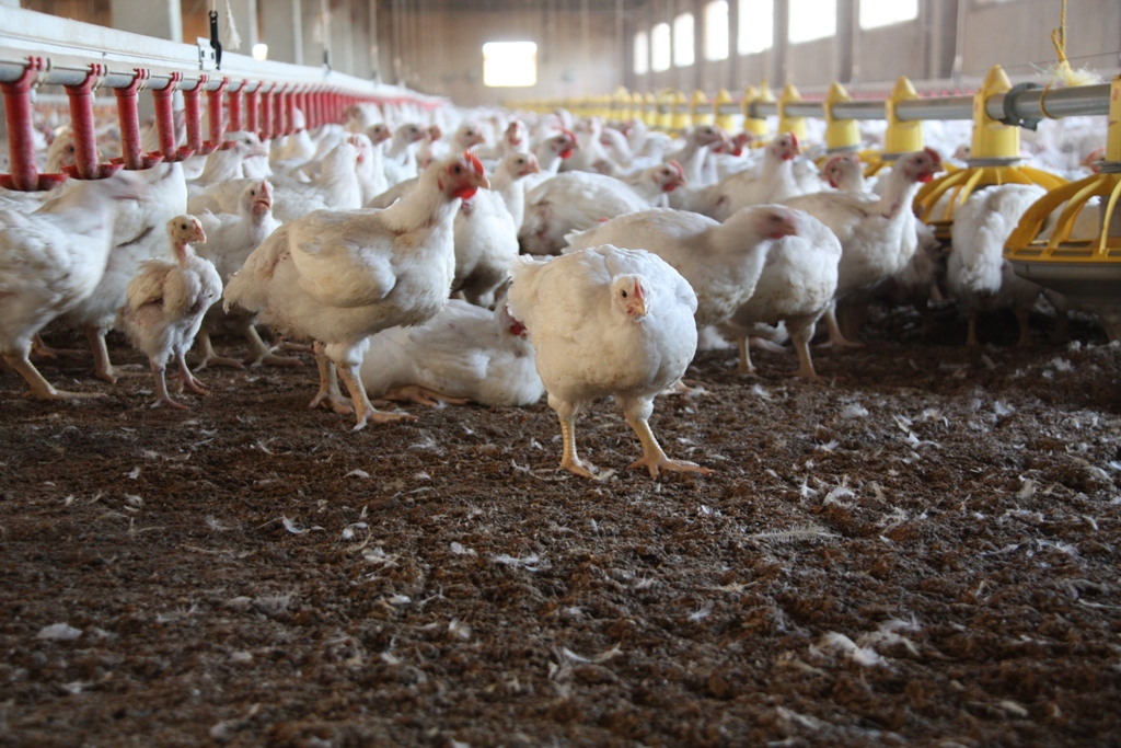 Chicken Farm